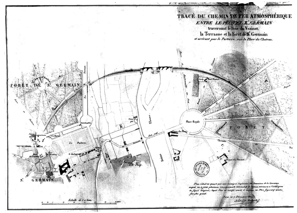 AN F 14 10912/108 ; un plan, daté du 7 décembre 1844 (fig. 52), signé par l’ingénieur des domaines de la couronne et intitulé « Tracé du chemin de fer atmosphérique entre Le Pecq et St Germain, traversant le Bois du Vésinet, la Terrasse et la Forêt de St Germain et arrivant par le Parterre sur la Place du château » se trouve dans AN F 14 10337 2 N° 1.